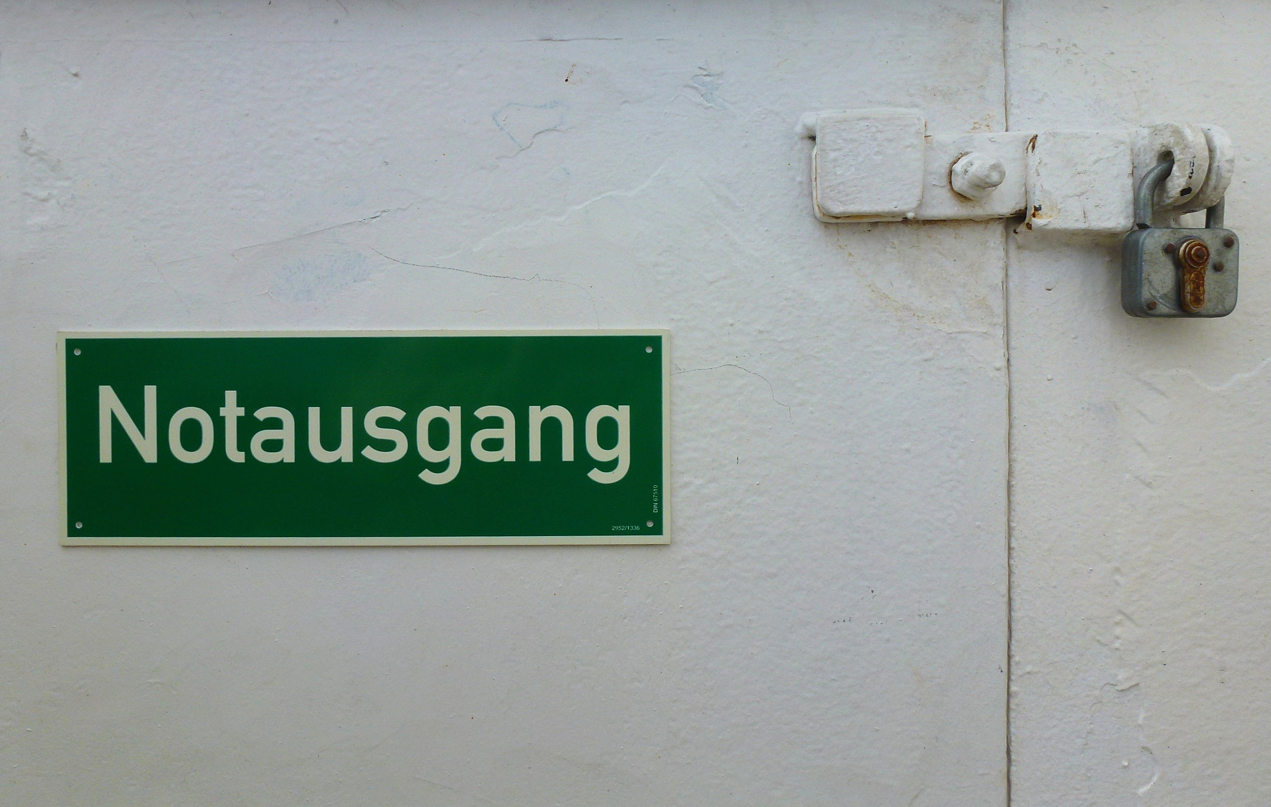 Nödutgång på en tysk bilfärja